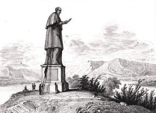 "St. Charles Boromée"